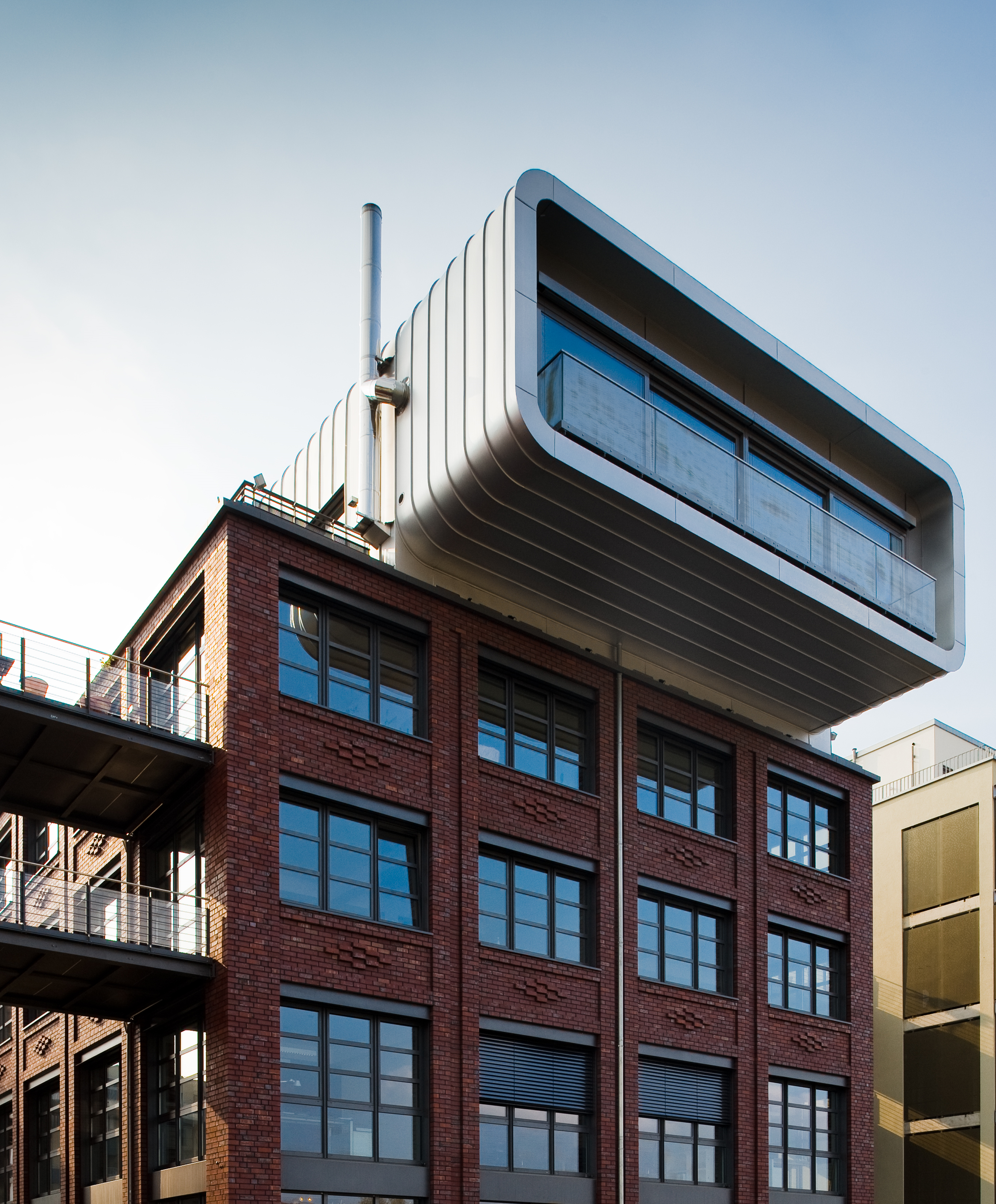 Loft-Haus, Wohnungsbauprojekt ILE, Düsseldorf